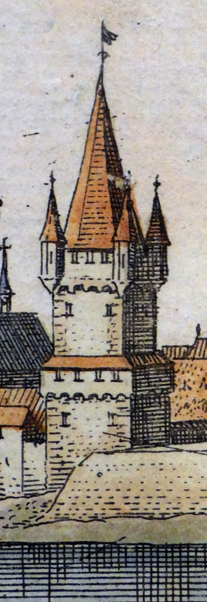 Neuturm, Worms. Detail aus: Matthäus Merian: Topographia Palatinus Rheni et Vicinarum Regionum. Hoffmann, Frankfurt 1645, Tafel zwischen S. 96 u. 97. Stadtarchiv Worms: Abt. 217 Nr. 1495; Eugen Kranzbühler: Verschwundene Wormser Bauten. Beiträge zur Baugeschichte und Topographie der Stadt. Kräuter’sche Buchhandlung, Worms 1905, Tafel vor S. V.